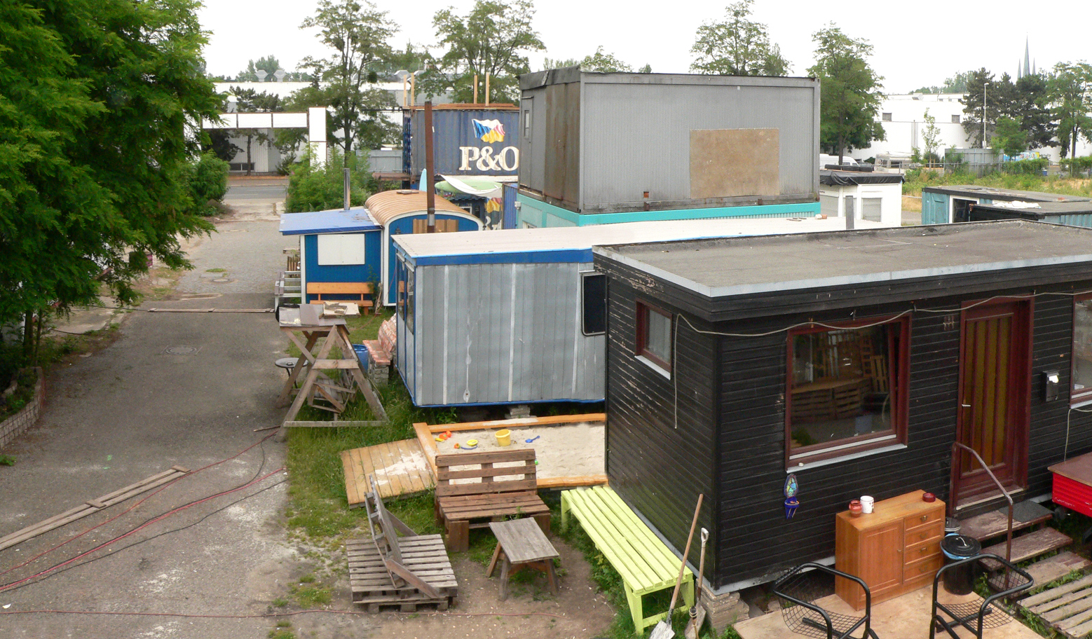 Blick über das Platzprojekt Hannover